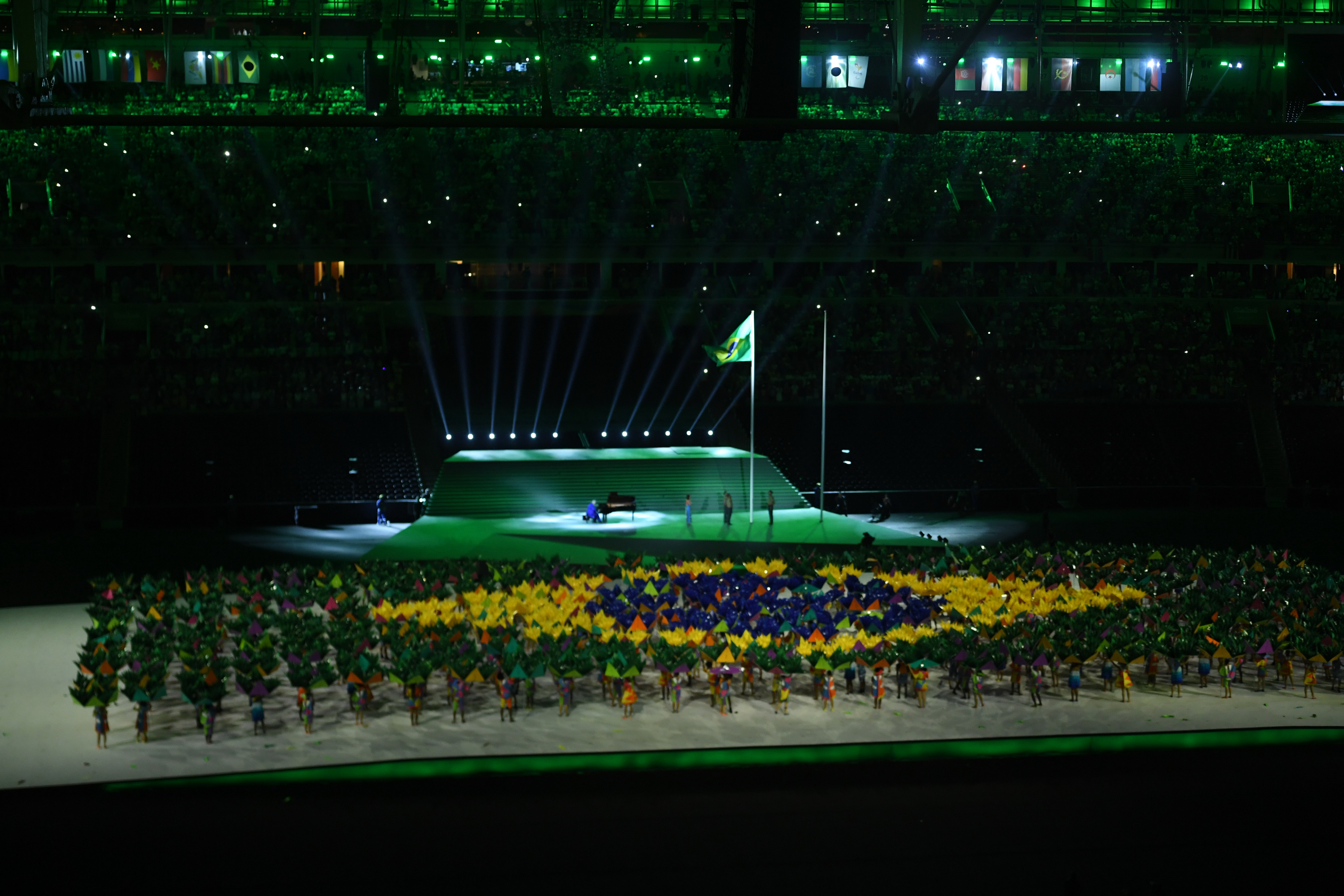 Rio de Janeiro - Cerimônia de abertura dos Jogos Paralímpicos Rio 2016 no Estádio do Maracanã